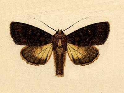 Heterochroma insignis